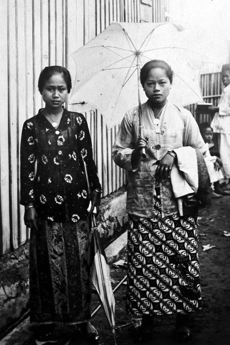 Repronegatief. Twee Soendanese vrouwen te Batavia